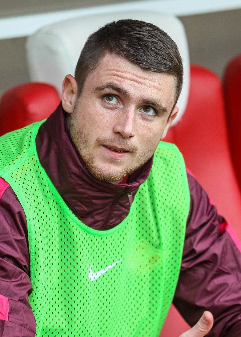 «Спартак» - «Анжи»